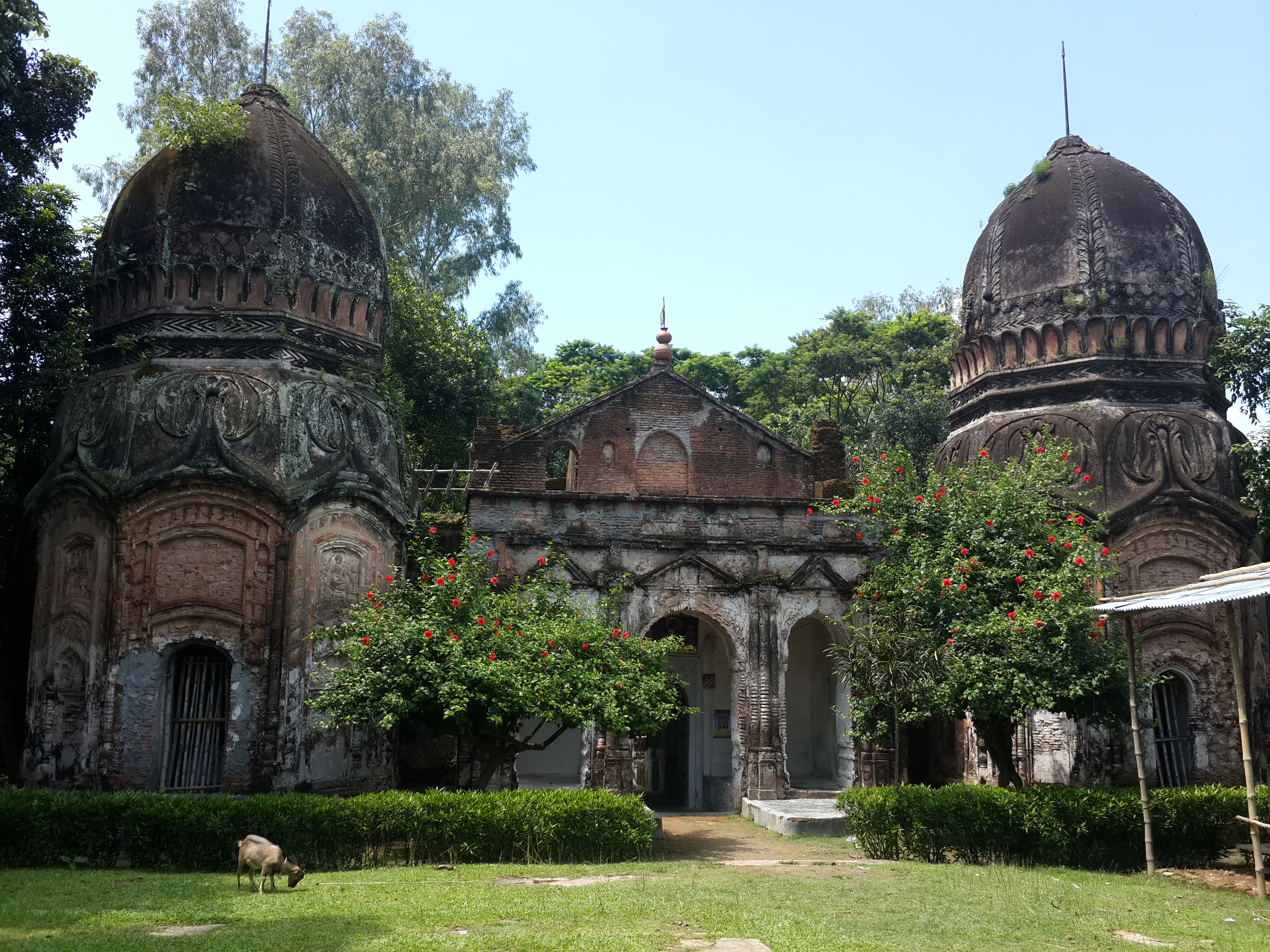 বলিহার জমিদার বাড়ি